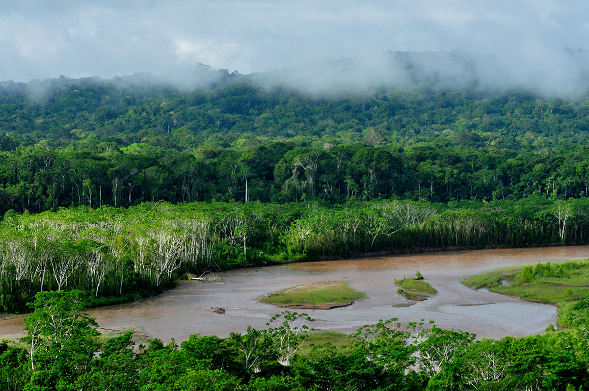 Fluss im Nationalpark Madidi in Bolivien